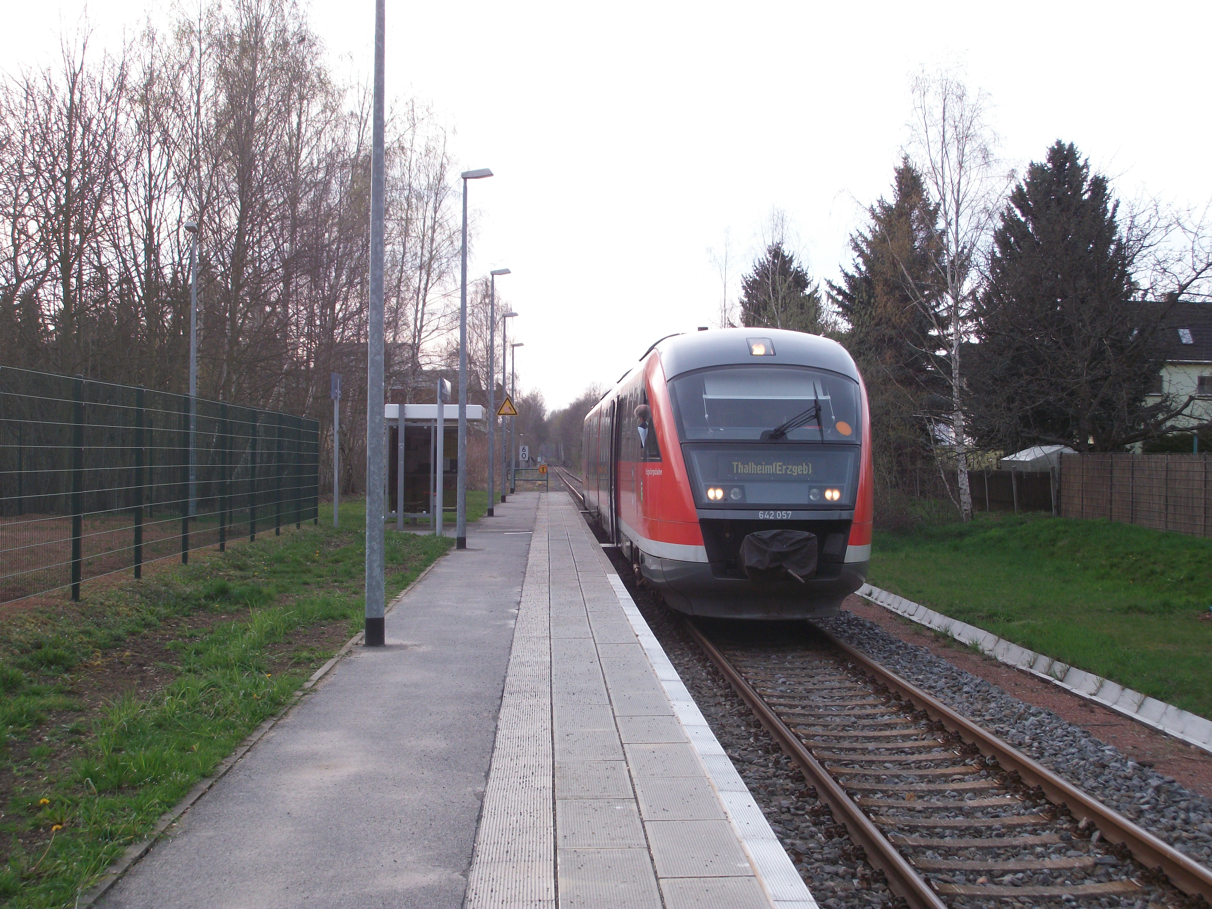 Haltepunkt Chemnitz-Reichenhain mit Triebwagen 642 057 der Erzgebirgsbahn (2016)